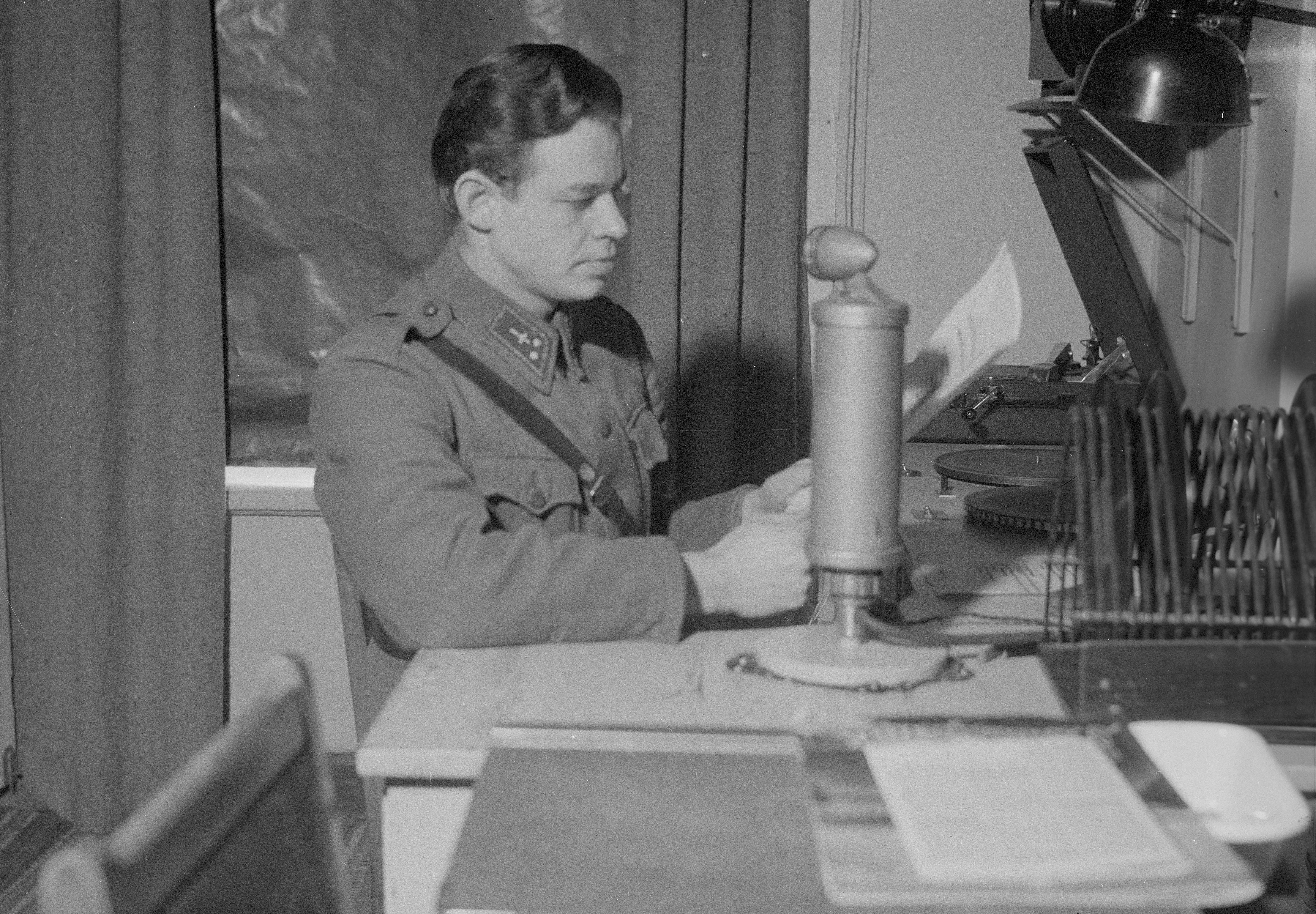 Aunuksen radion henkilöitä: Kuuluttaja sotavirkailija Kauko Käyhkö.